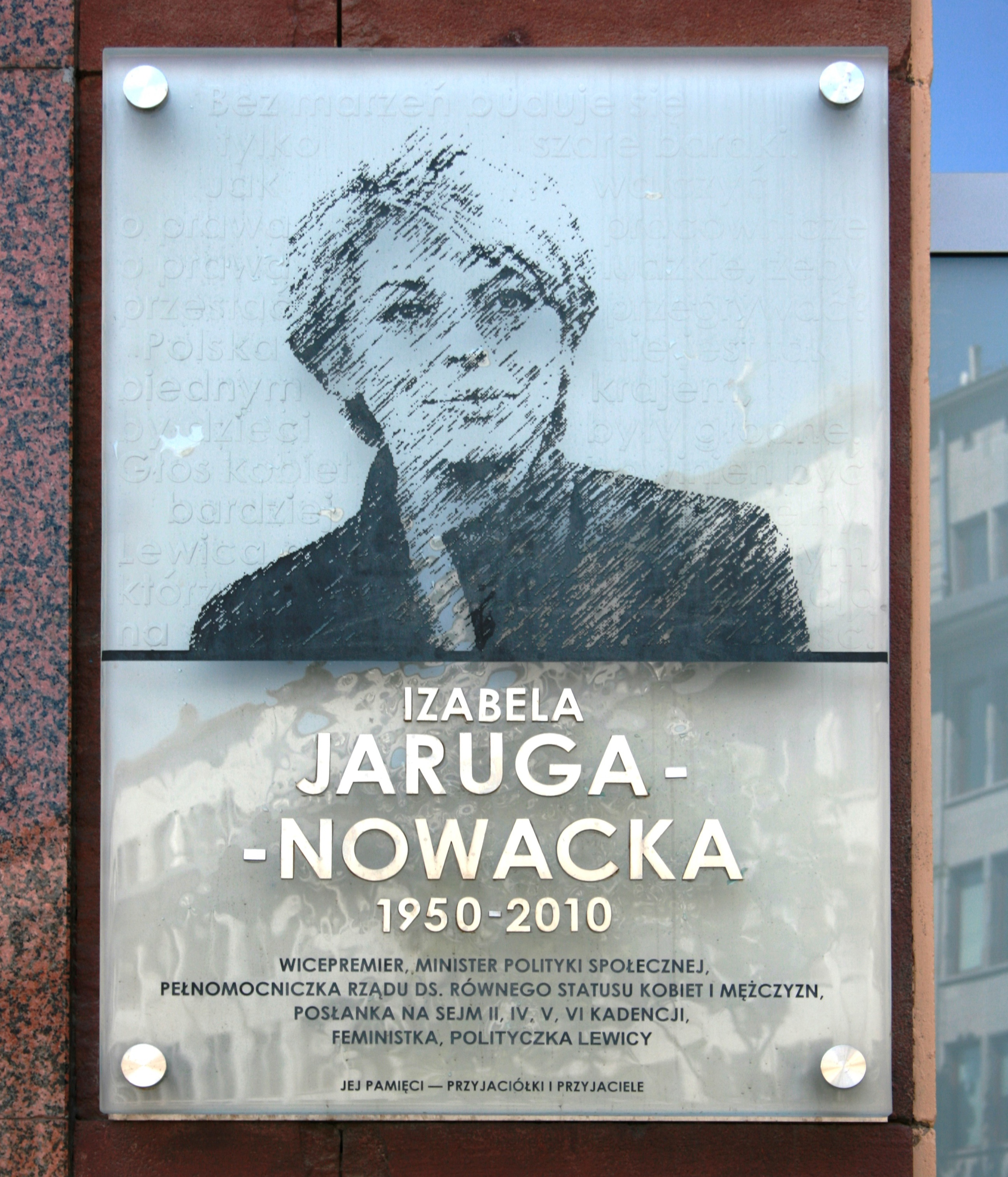 Tablica poświęcona Izabeli Jarudze-Nowackiej na ścianie gmachu Ministerstwa Pracy i Polityki Społecznej w Warszawie przy ul. Brackiej w Warszawie